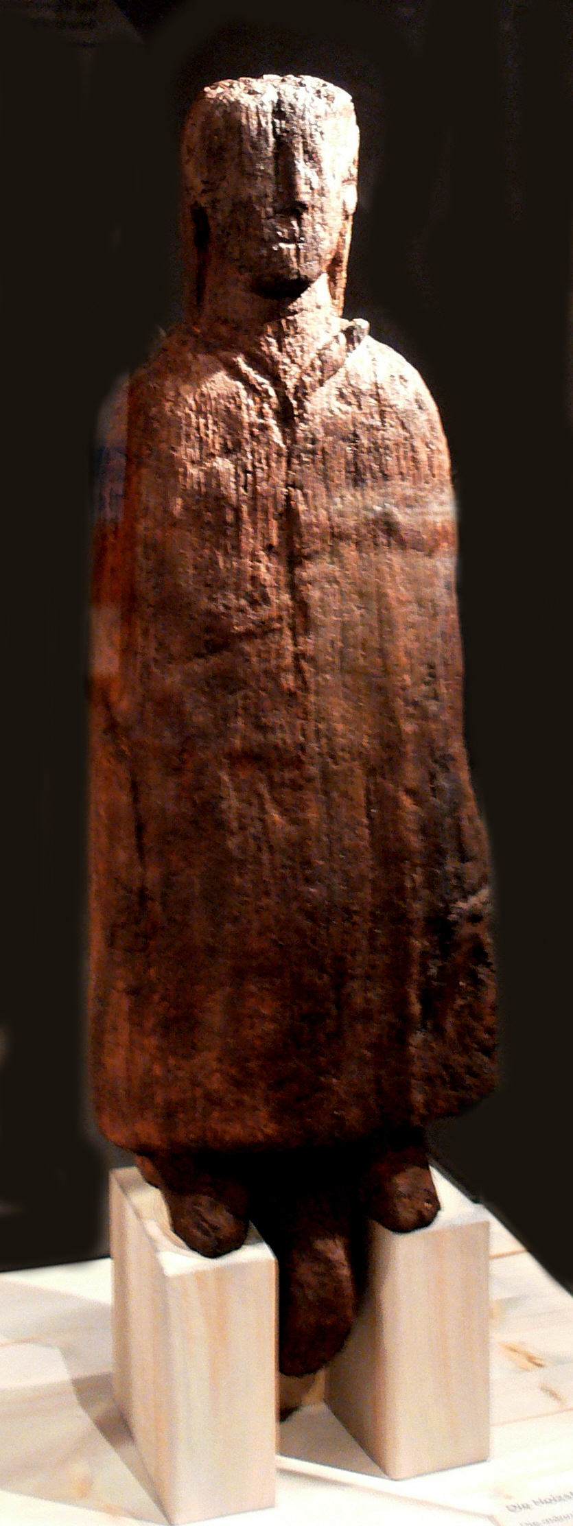 Kopie der spätkeltischen Holzstatue mit Kapuenmantel und Haaren, die 1977 in einem römischen Abwasserkanal in Eschenz (Thurgau, Schweiz) entdeckt wurde (Datierung: ca. 9 v. Chr +/- 10 Jahre); Amt für Archäologie Thurgau